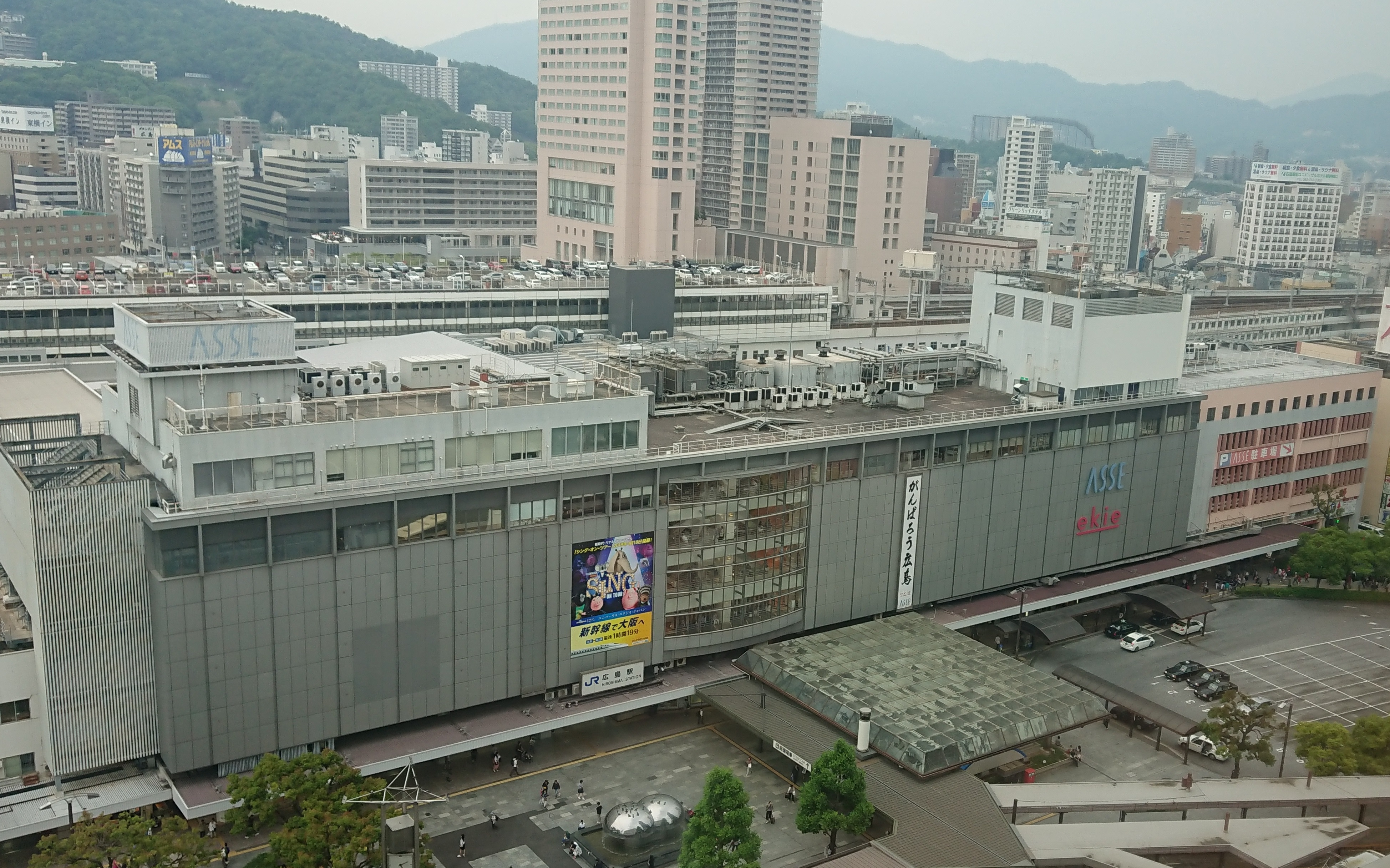 広島駅、2代目駅舎。